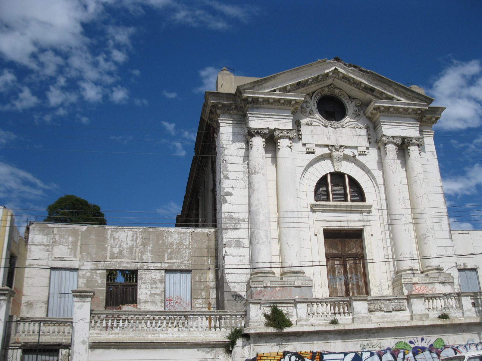 Frontis de la Capilla de la Providencia en Valparaíso. Se encuentra en This is a photo of a national monument in Chile: 583